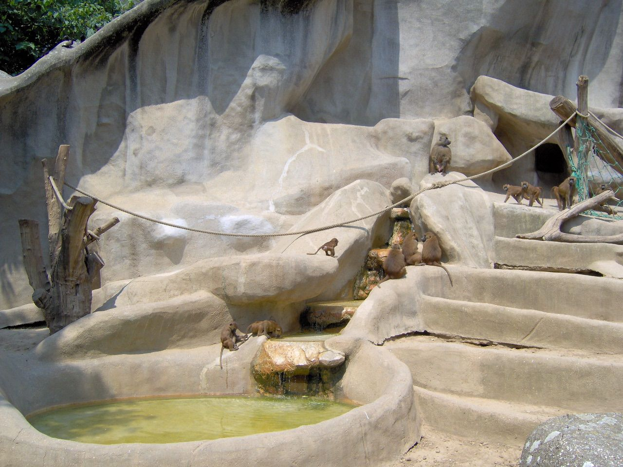 Papio papio in Parc Zoologique de Vincennes, Paris